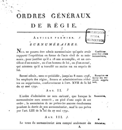 Première page des ordres Généraux de la Régie de l'enregistreent